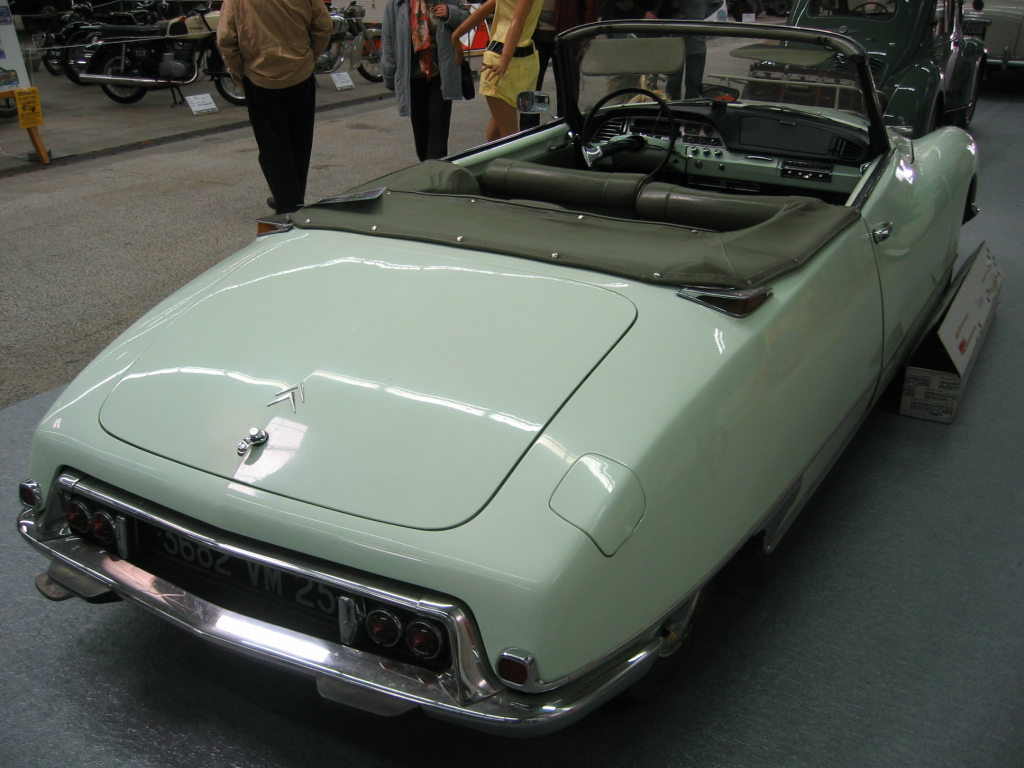 Citroen DS cabriolet